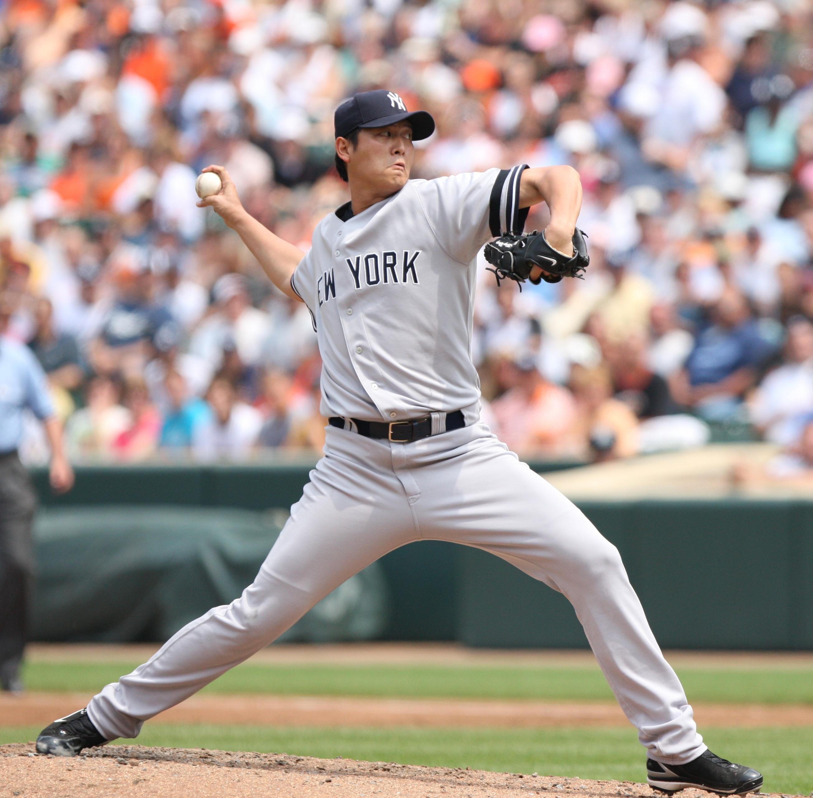 Chien-Ming Wang